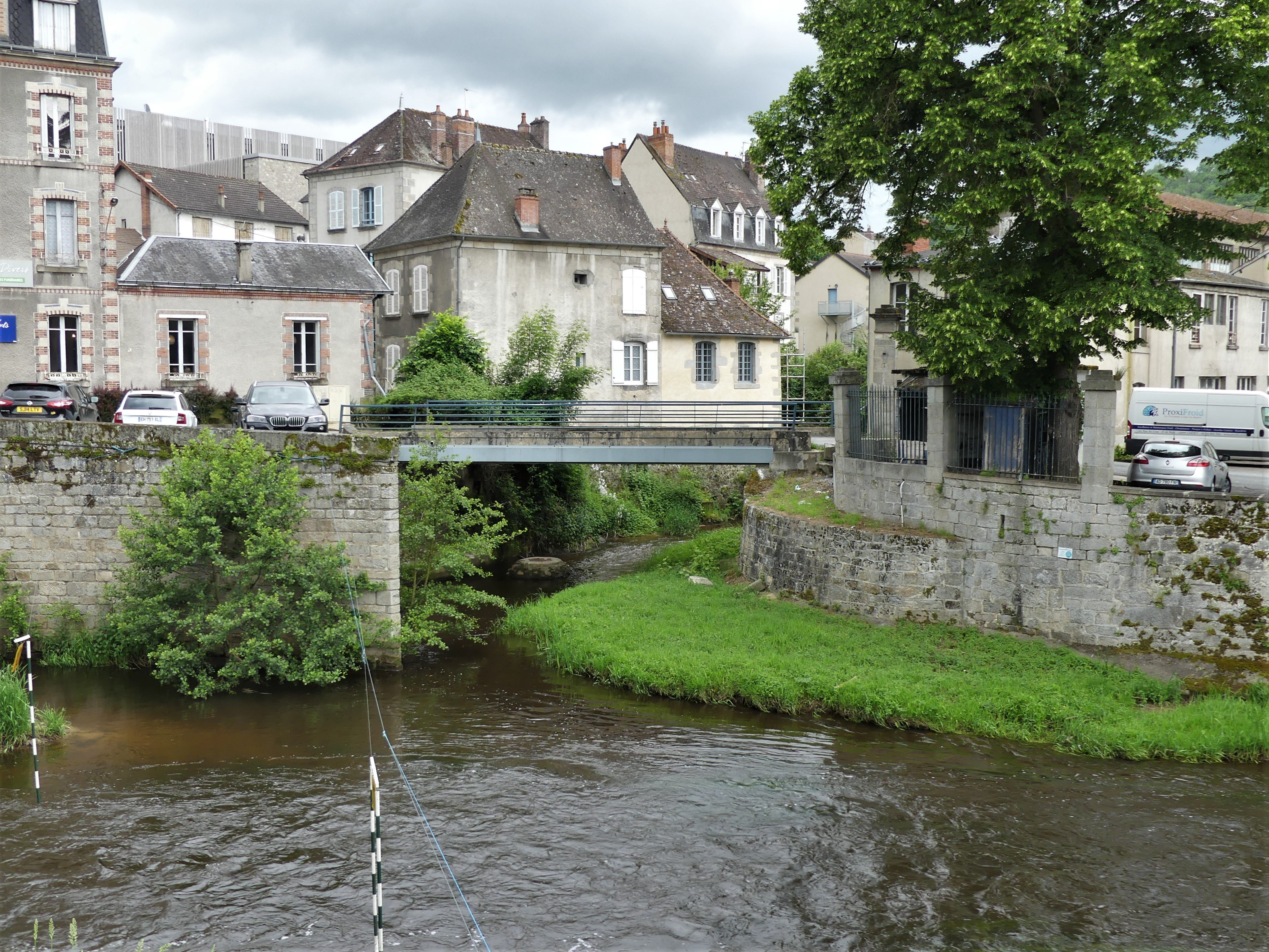 Le confluent de la Beauze (en face) et de la Creuse (qui coule de gauche à droite), Aubusson, Creuse, France.